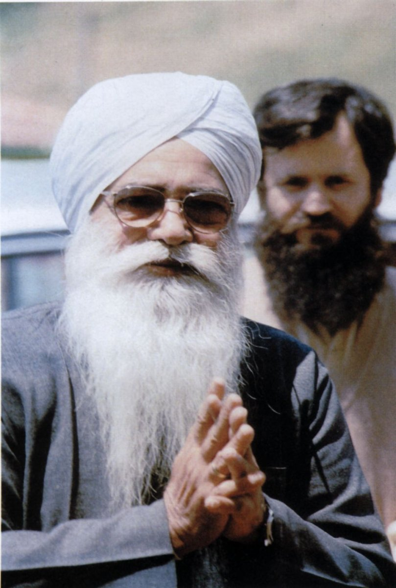 Sant Ajaib Singh e Sirio Carrapa a Ribolla